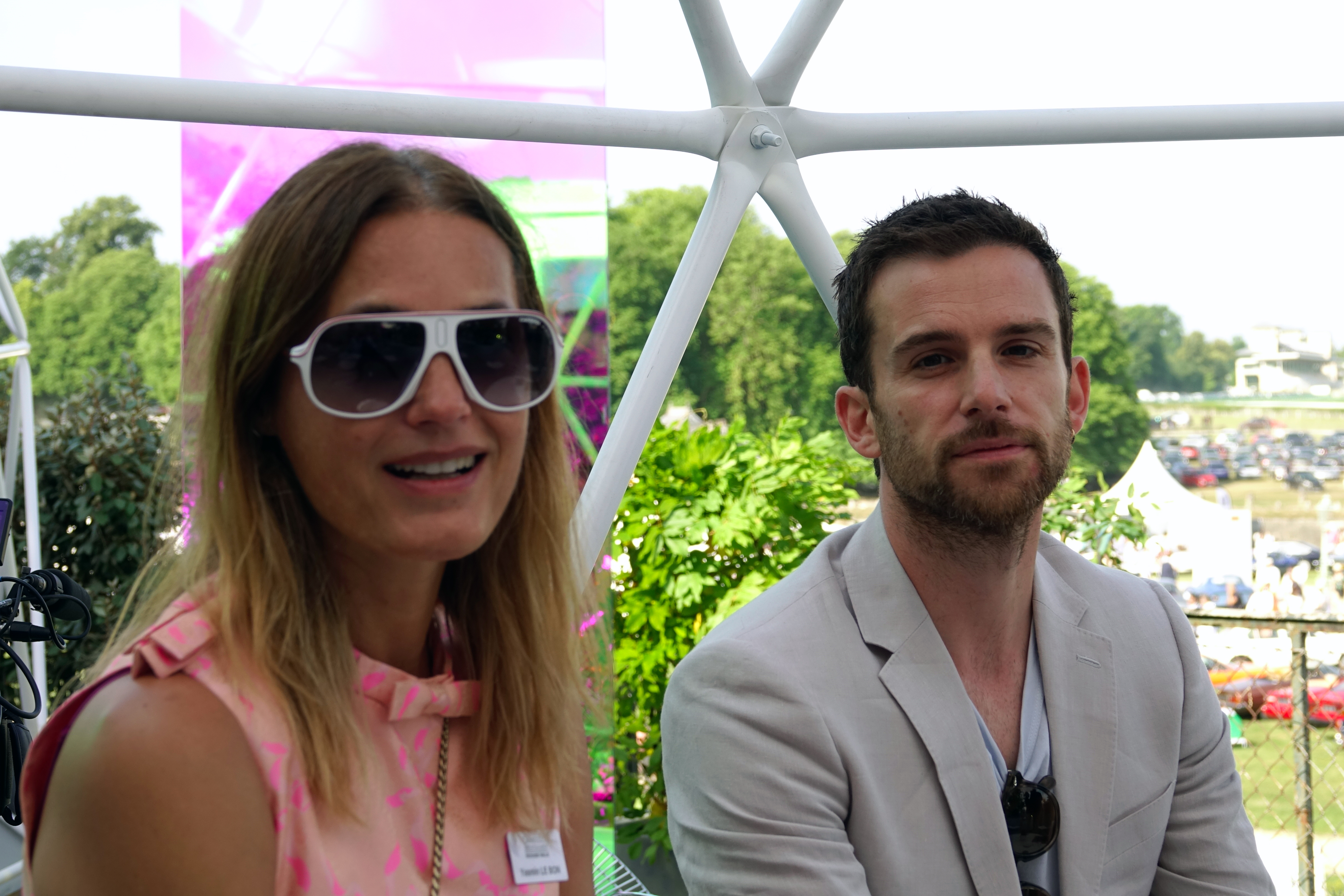 Yasmine Le Bon et Guy Berryman au Chantilly Arts & Elegance Richard Mille 2019